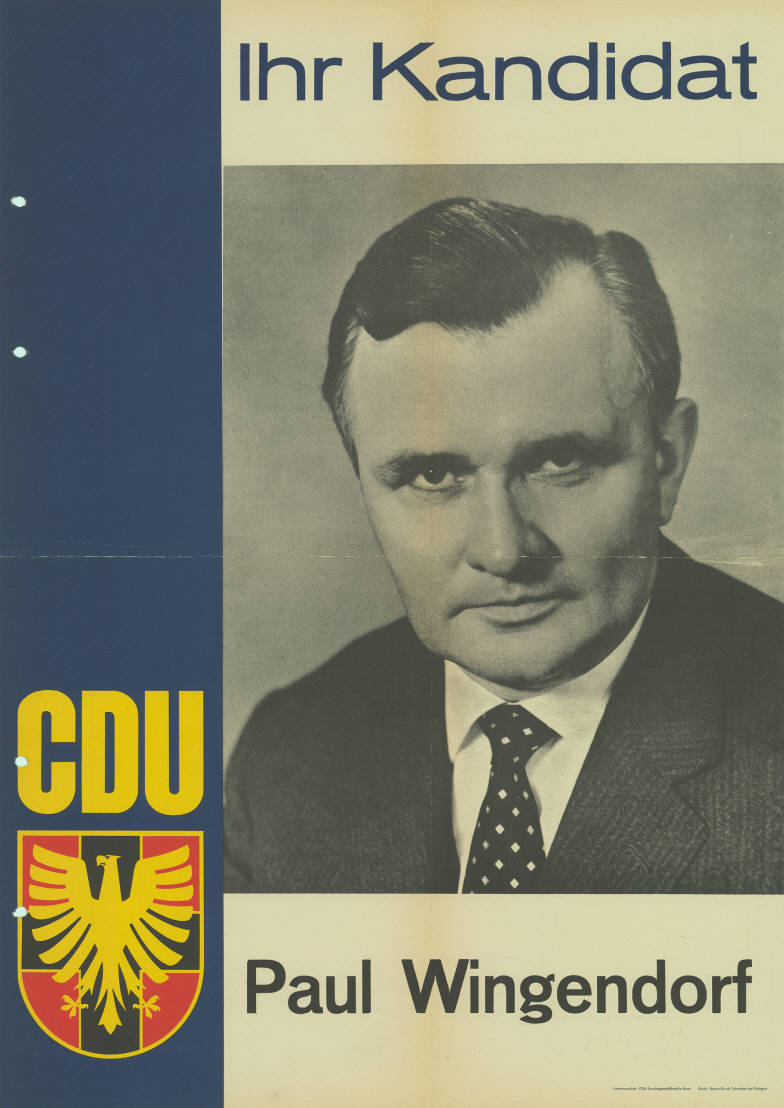 Ihr Kandidat CDU Paul Wingendorf Abbildung: Porträtfoto Kommentar: Rückseitig rot beschriftet. Plakatart: Kandidaten-/Personenplakat mit Porträt Auftraggeber: Verantw.: CDU-Bundesgeschäftsstelle Bonn Drucker_Druckart_Druckort: Repro-Druck, Schmiden bei Stuttgart Objekt-Signatur: 10-010 : 226 Bestand: Landtagswahlplakate Rheinland-Pfalz (10-010) GliederungBestand10-18: Landtagswahlplakate Rheinland-Pfalz (10-010) » CDU Lizenz: KAS/ACDP 10-010 : 226 CC-BY-SA 3.0 DE